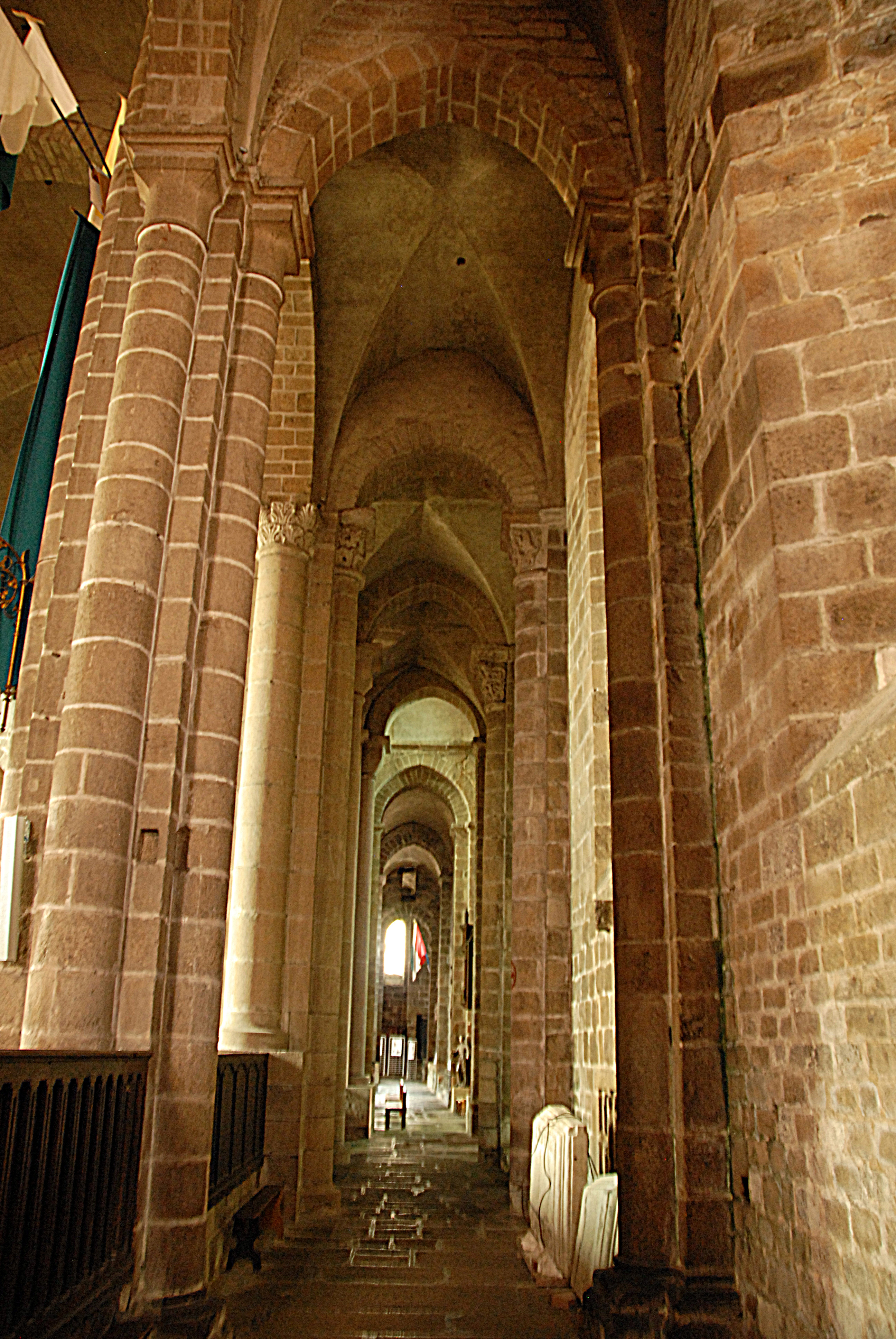 St-Junien, nördl. Seitenschiff des Chors, nach hinten